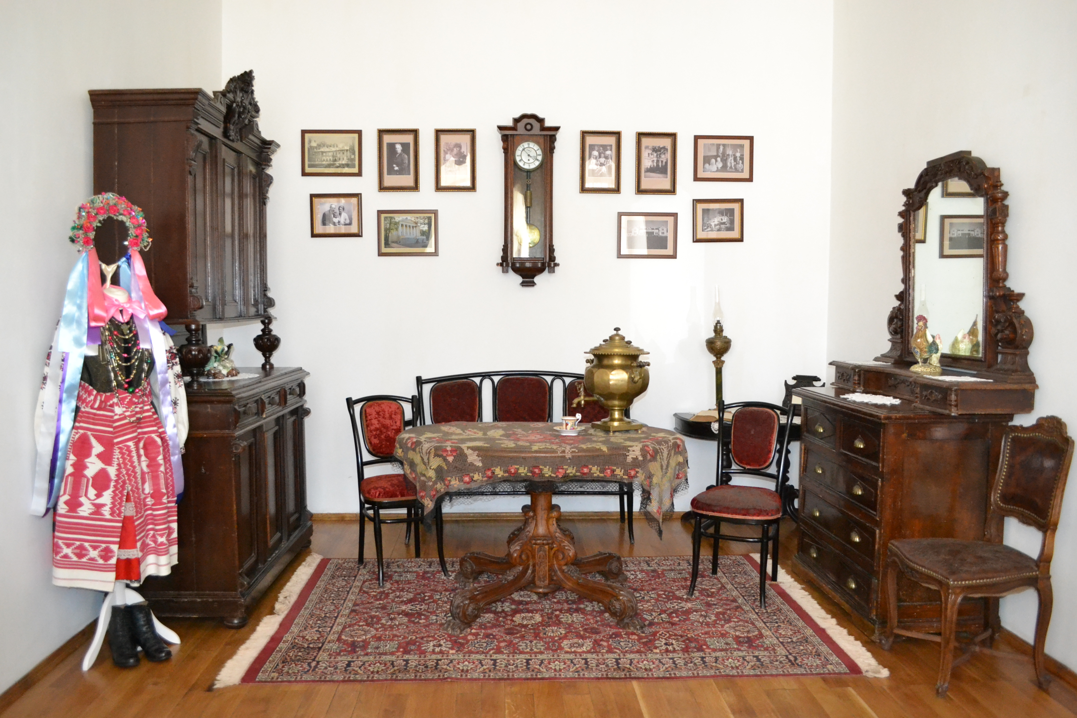 Експозиція Музею Будинок Кочубея